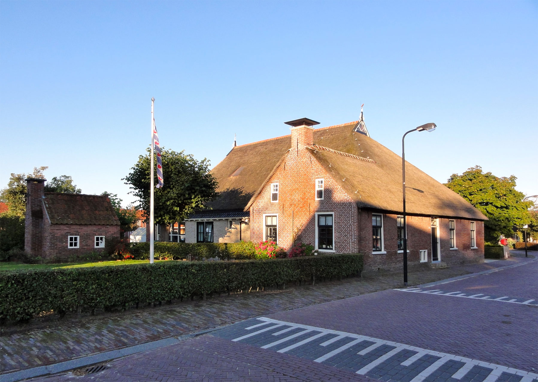 Woonhuis Schoolstraat 6 Jistrum